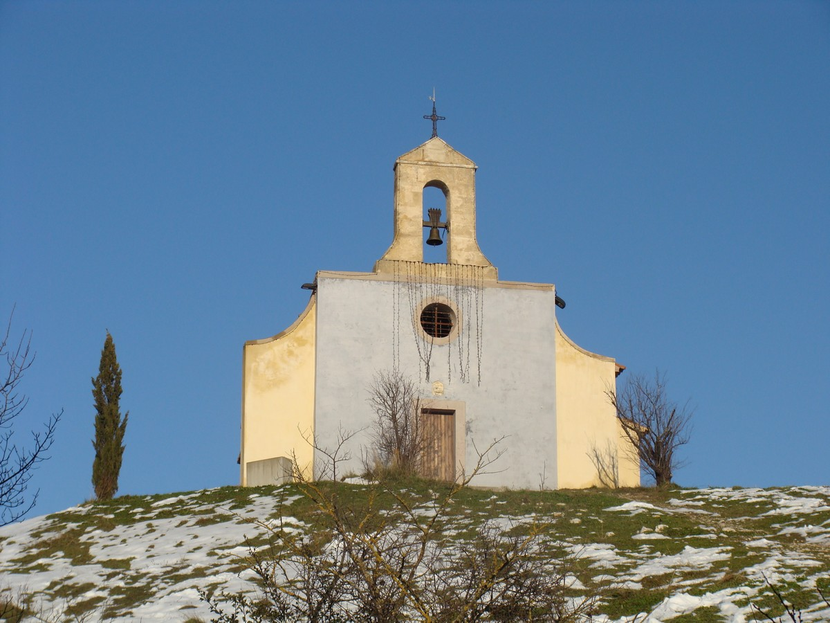 La chapelle Notre-Dame-de-la-Salette, sur la colline Saint-Martin, à Calas, commune de Cabriès, Bouches-du-Rhône.